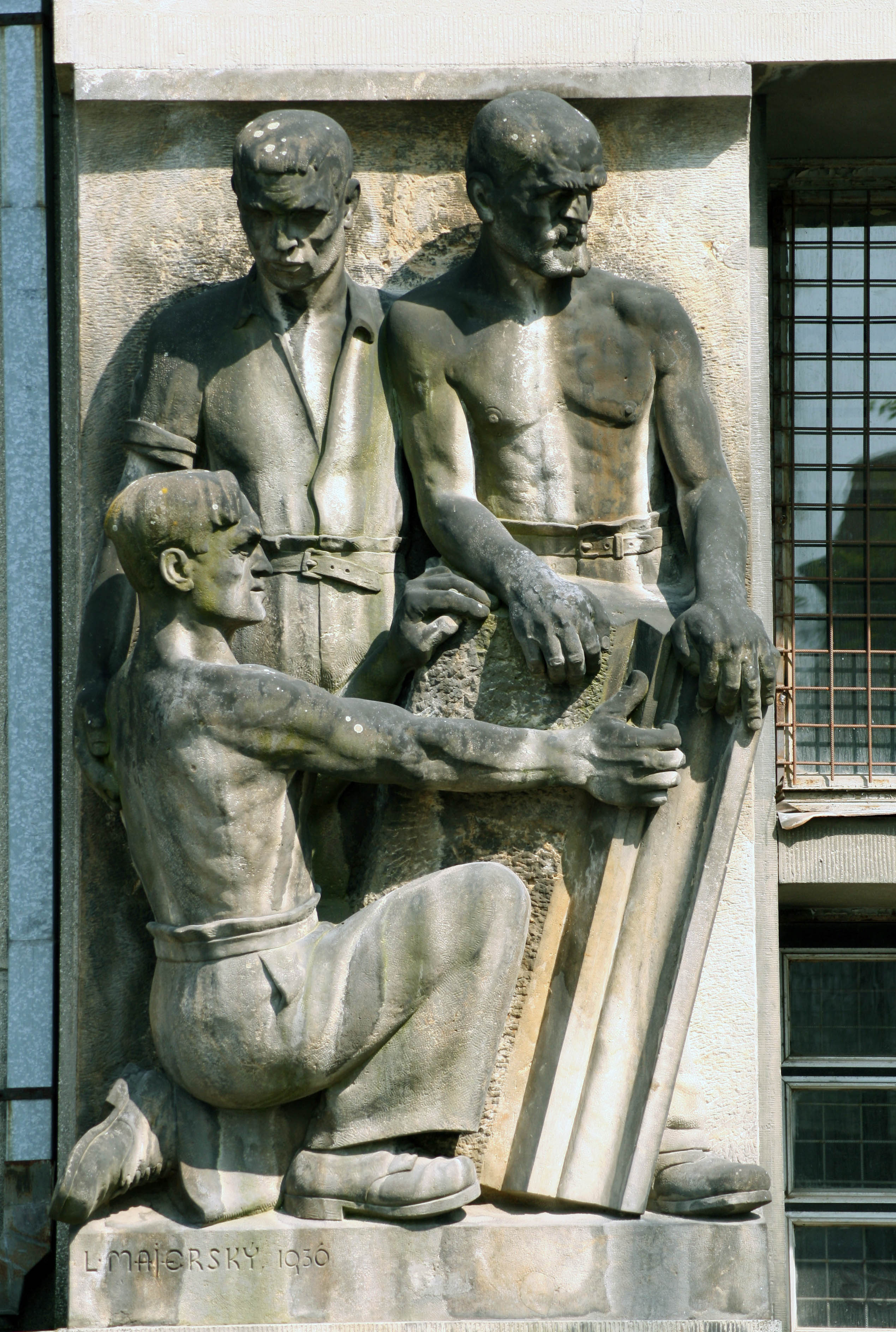 Práca II, trojfigurálny monumentálny reliéf od Ladislava Majerského na portáli budovy (vľavo) na Bezručovej ulici č. 5 v Bratislave z roku 1936